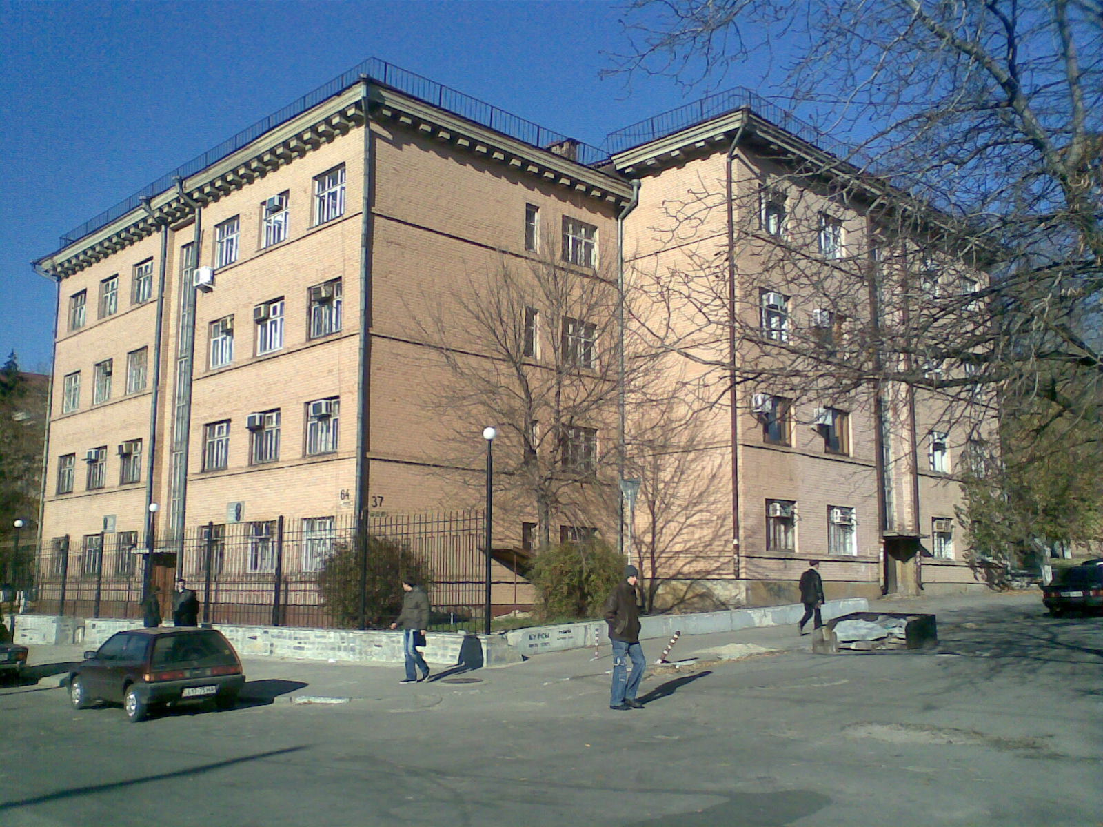 Запорожский Национальный Технический Университет - административный корпус на пересечении улиц Тургенева и Гоголя.